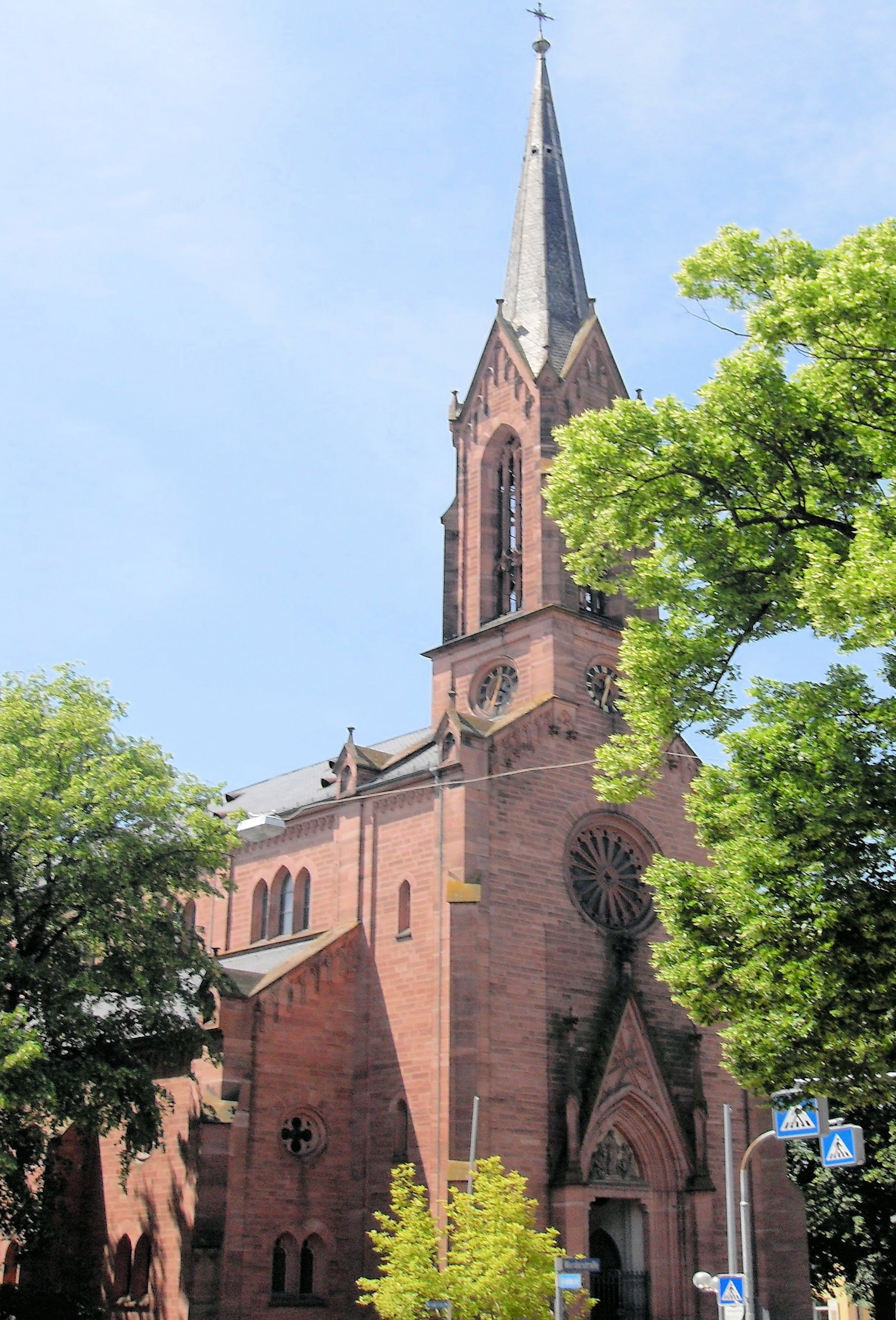 Evangelische Kirche in Müllheim, Baden